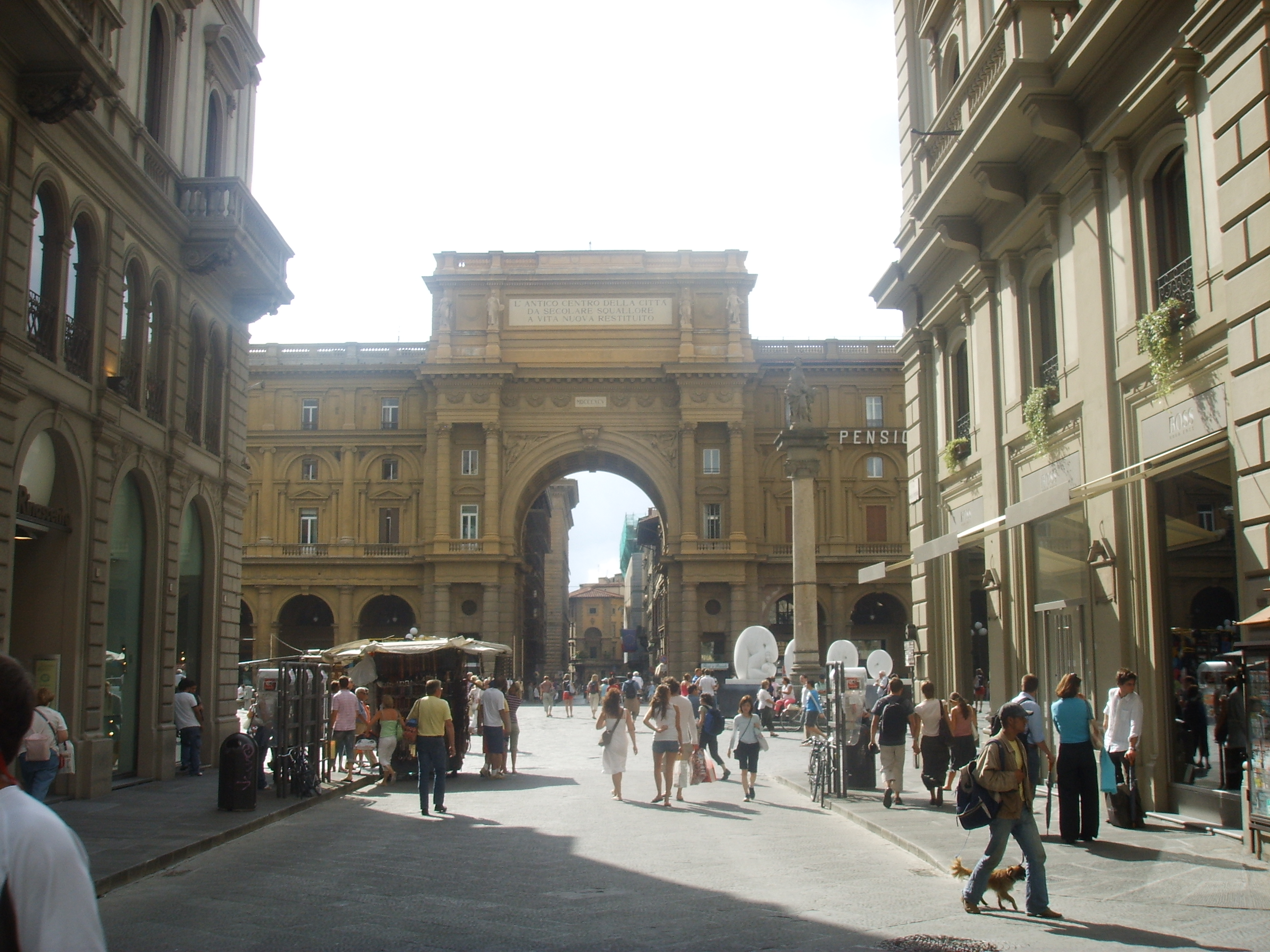 Piazza della Repubblica in Florence, italy